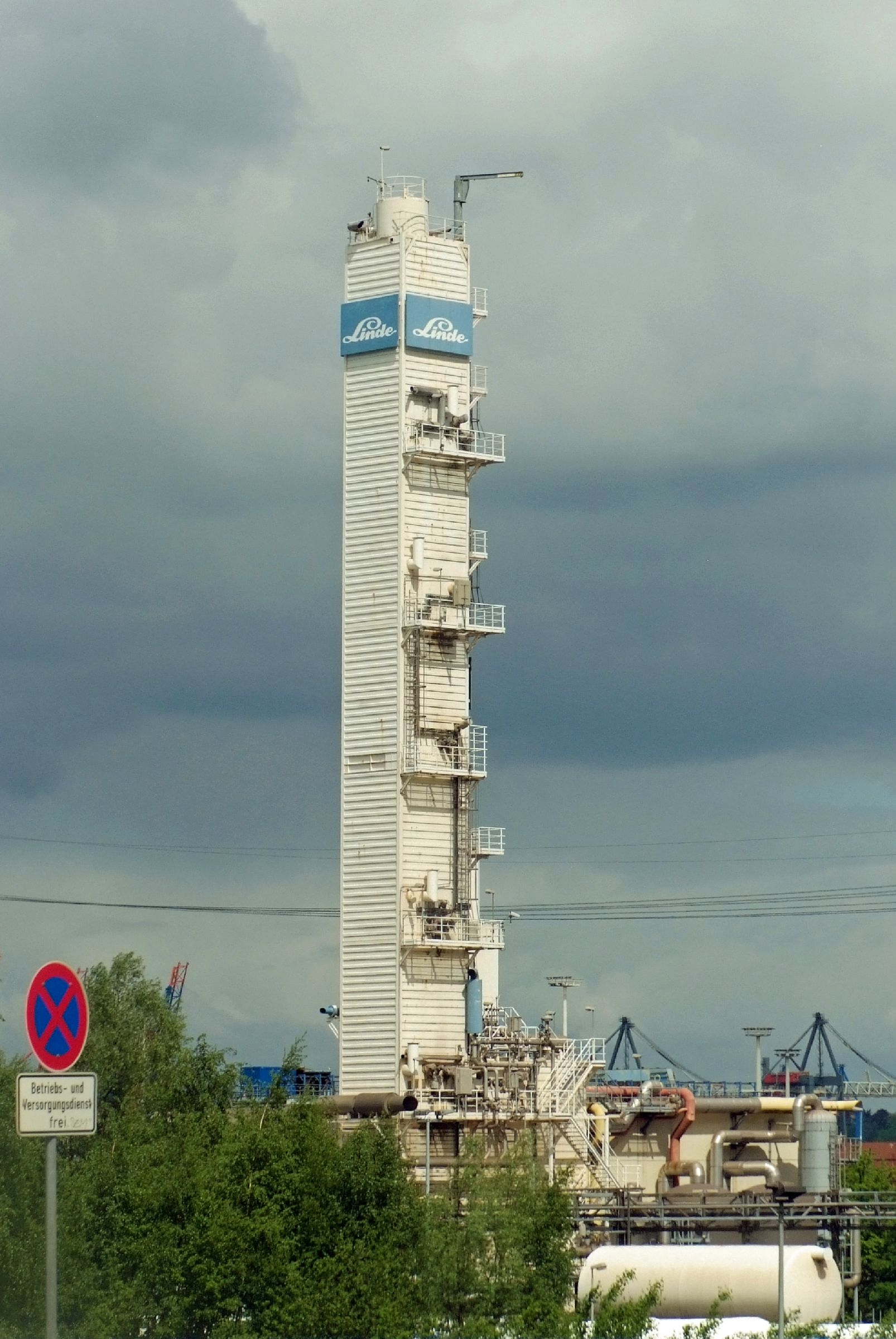 Linde - Luftzerleger in Hamburg-Waltershof